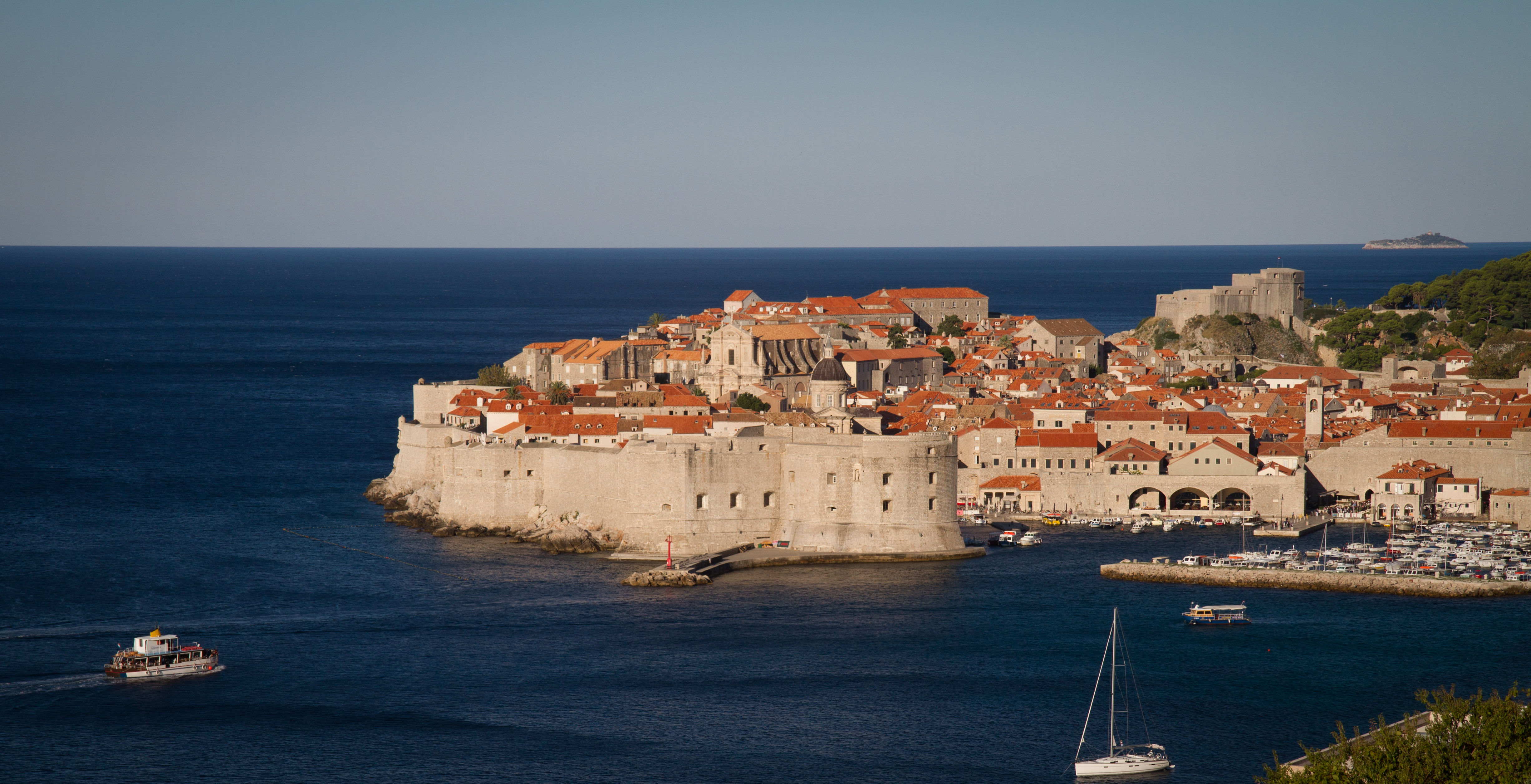 Croatia-4575.jpg